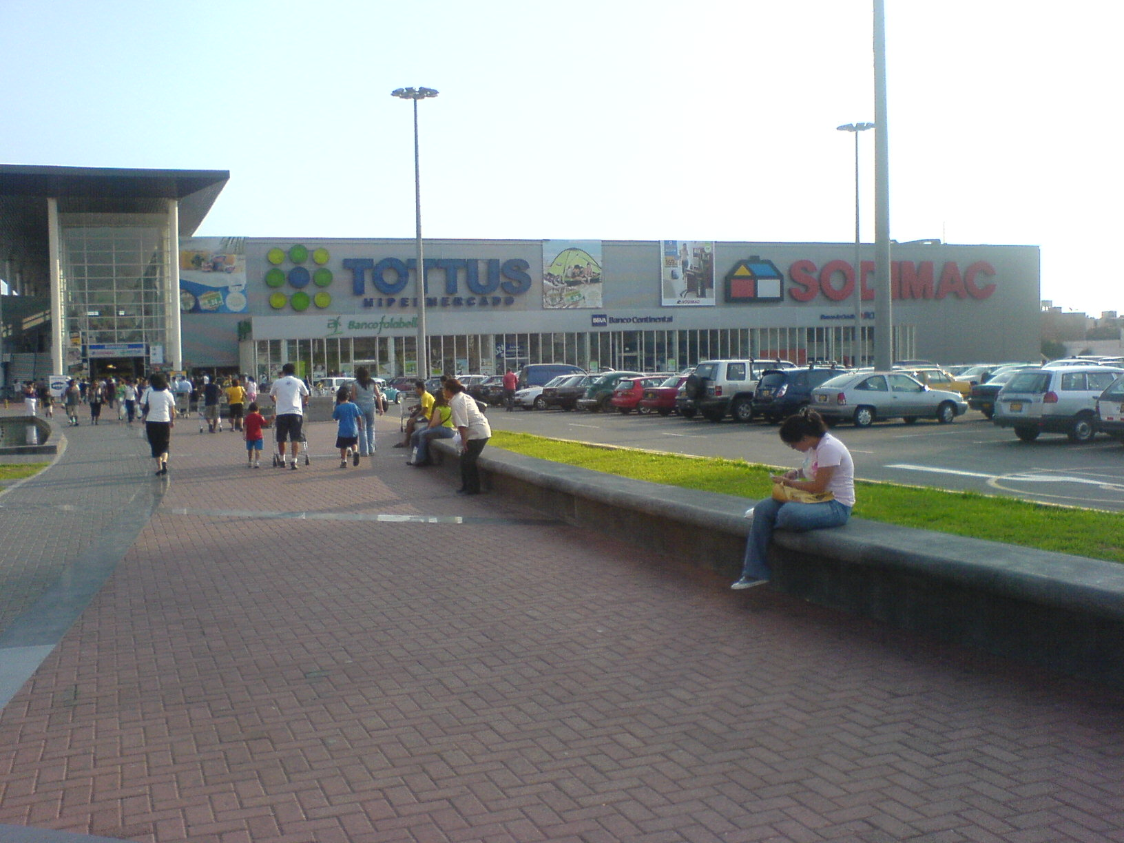 Hipermercado Tottus y Home Center Sodimac en el Distrito de San Miguel Lima, Peru